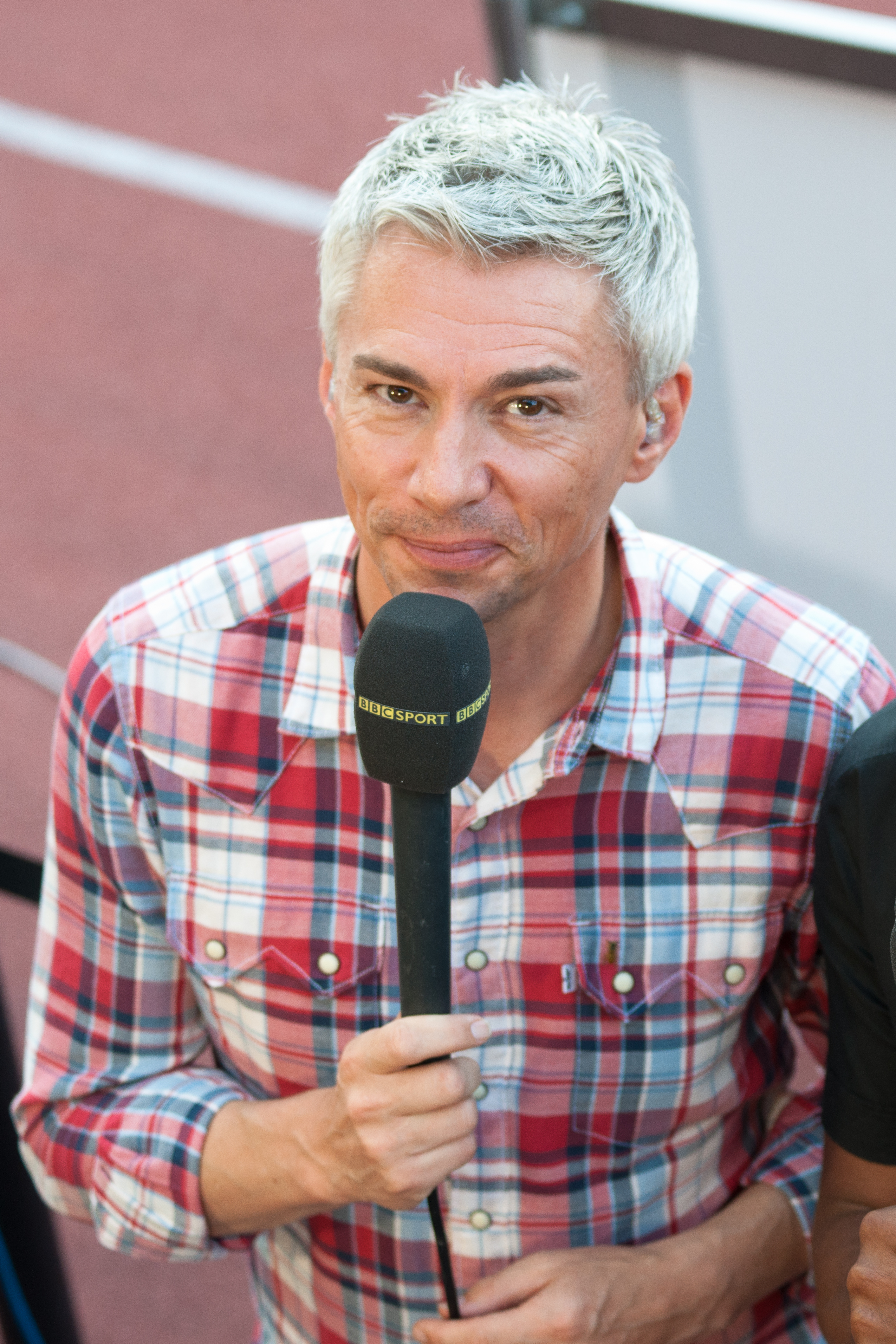 Athletissima 2012 - Jonathan Edwards